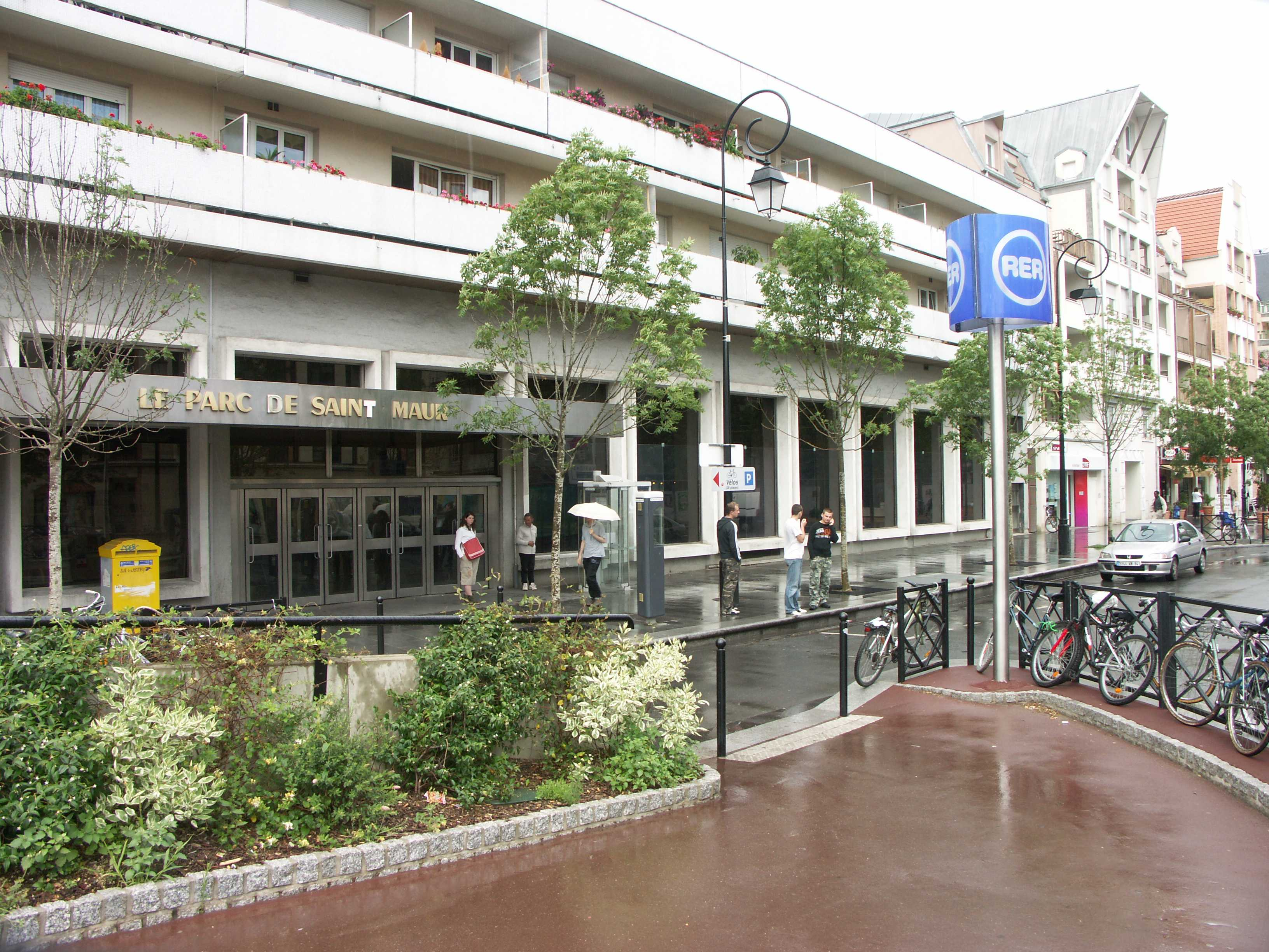 Gare RER ligne A - Parc de St Maur - Facade extérieure de la gare